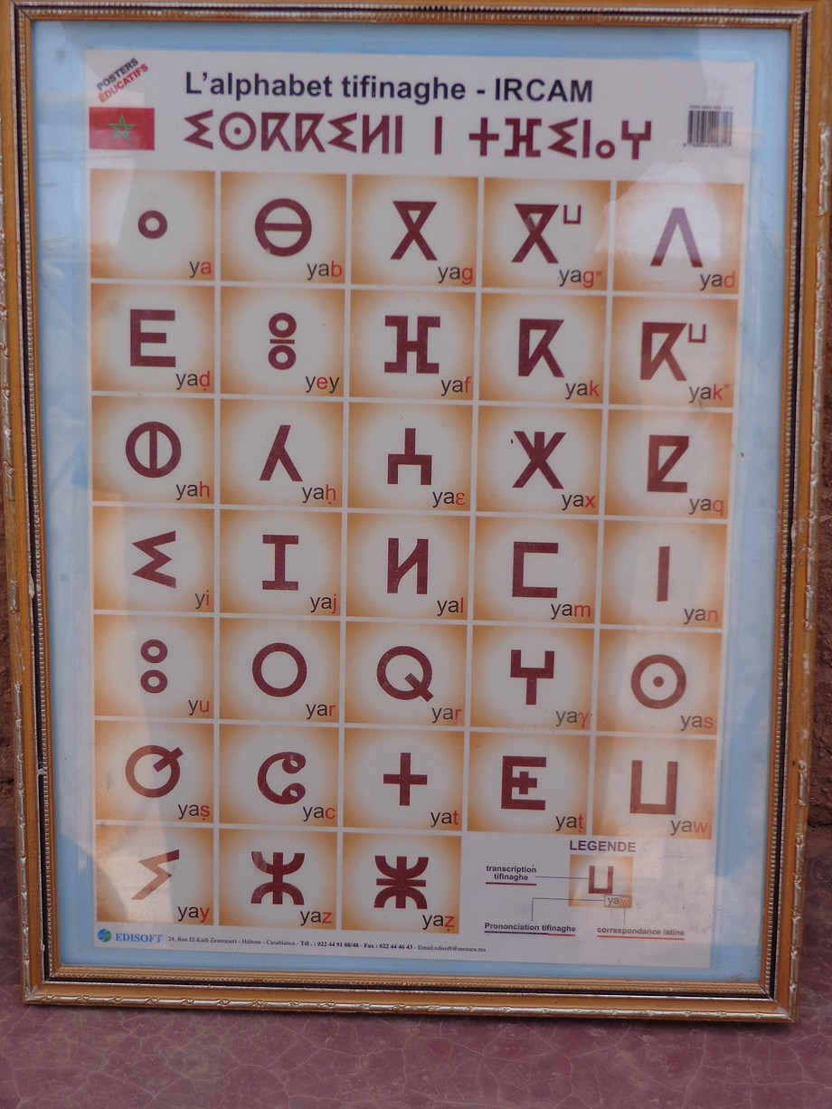 Tableau des alphabet amazighe standard marocain.